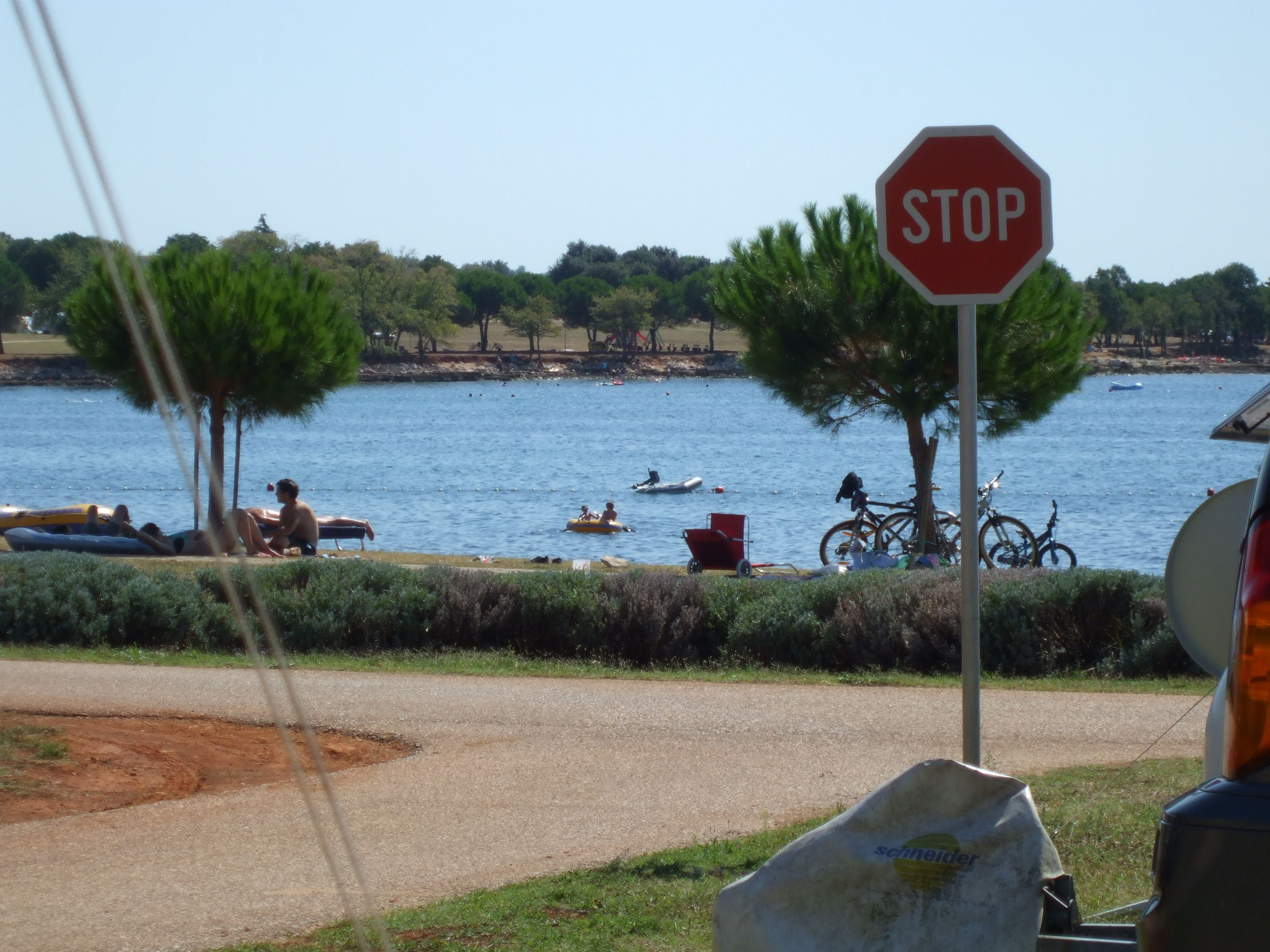 Campingplatz - Park Umag - Kroatien